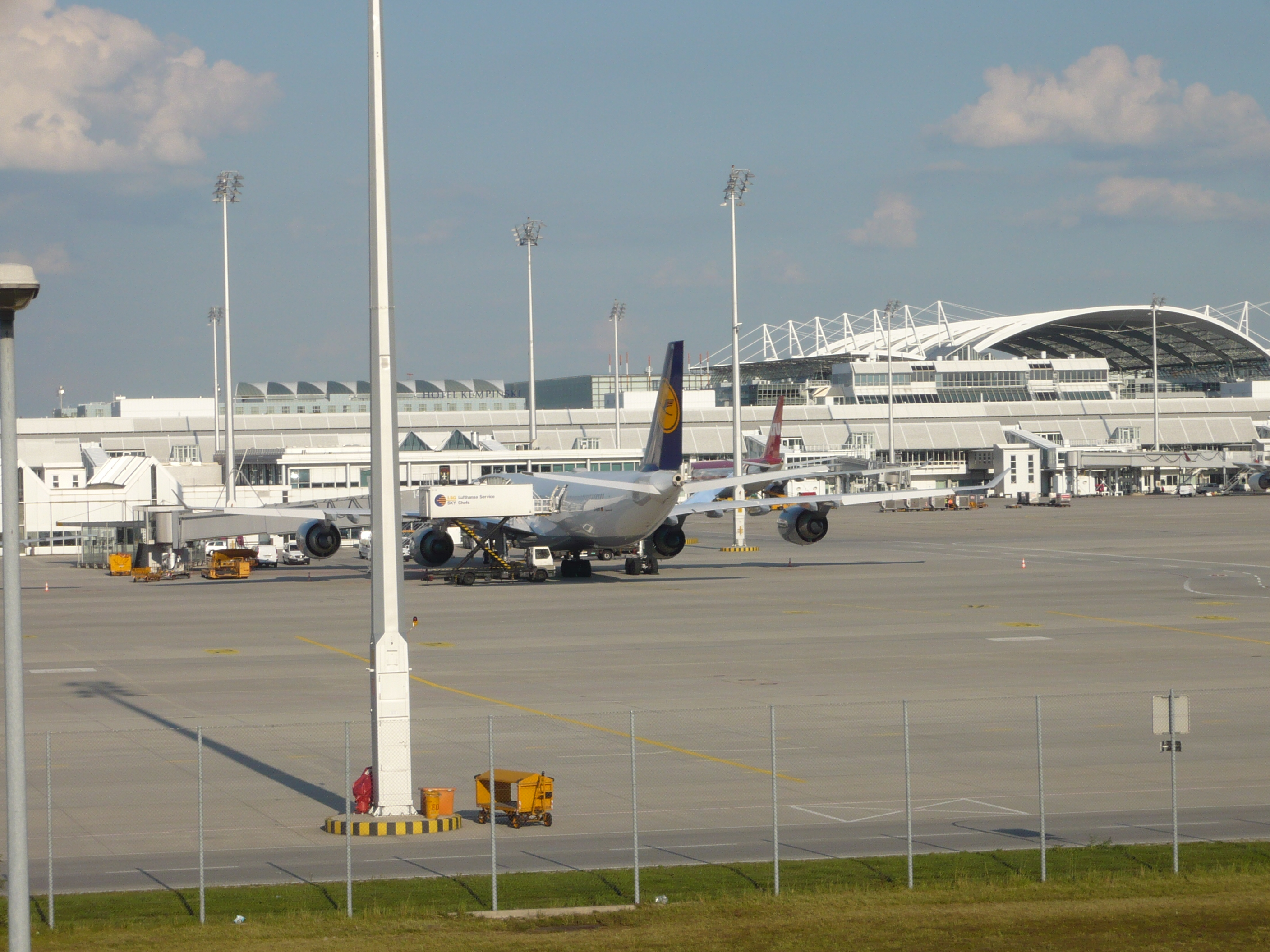 Lufthansa-Airbus-A340-600 am Vorfeld des Terminal 1 des Flughafen Münchens